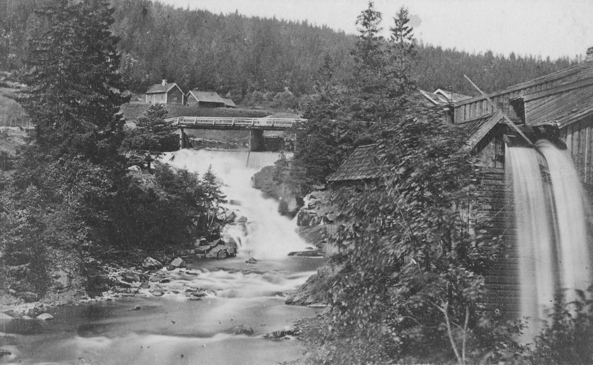 Hammeren i Maridalen, ca 1880, før bygging av kraftverket.